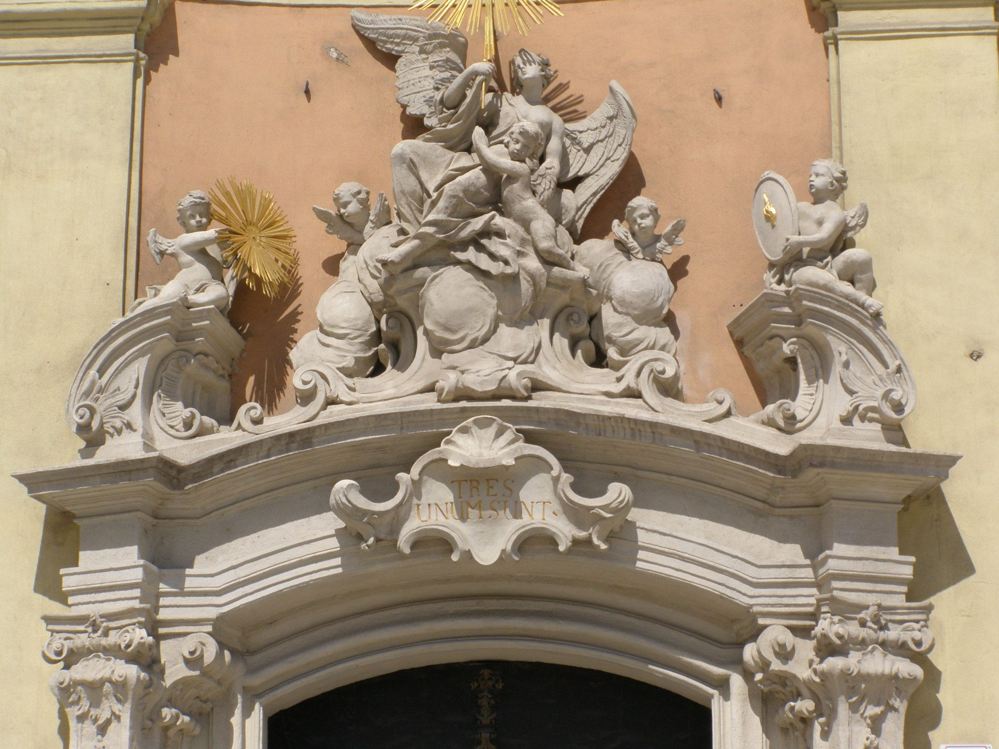 Plastická výzdoba nad portálom kostola. Latinský nápis TRES UNUM SUNT (Traja jedno sú) pripomína zasvätenie kostola